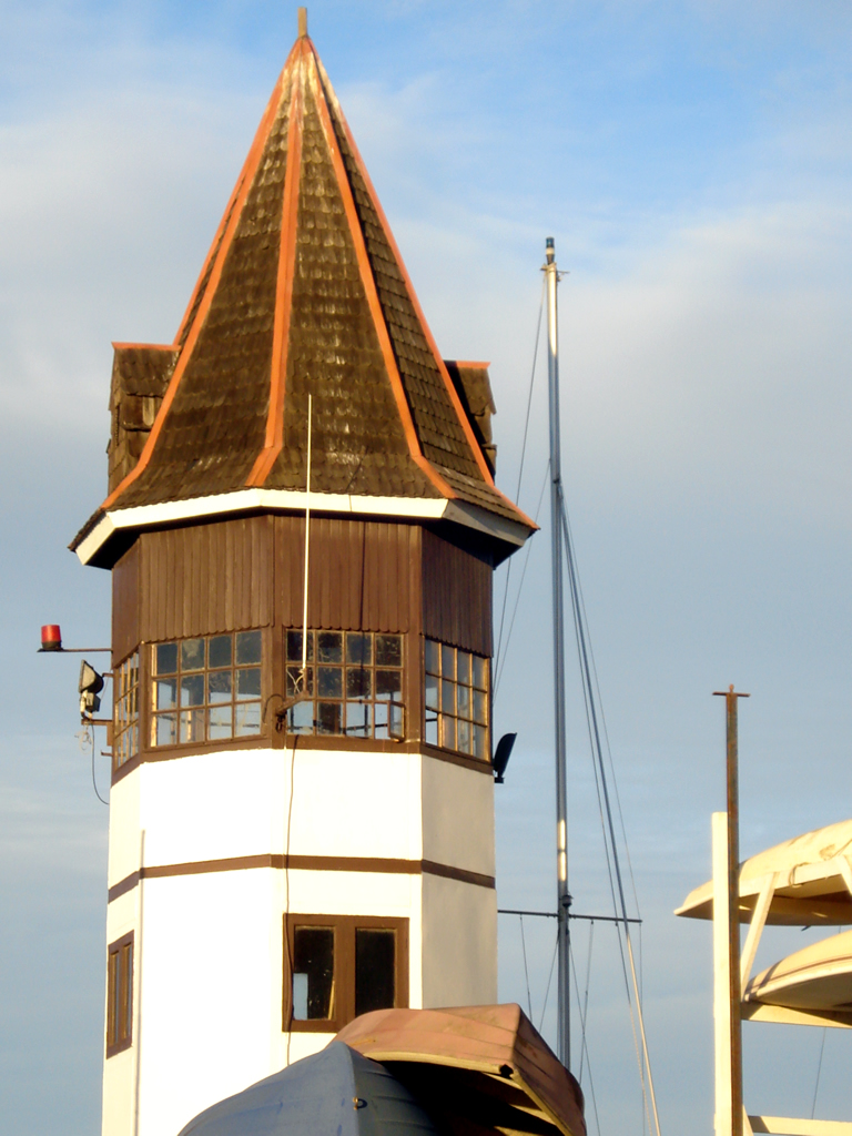 Torre del club de yates de Papudo, restaurante El Faro.